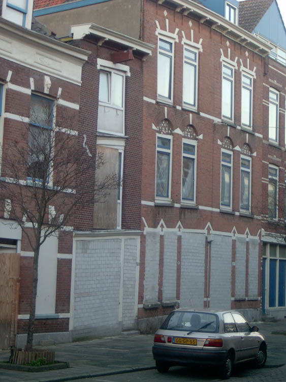 Verzakt pandje in het Oude Noorden in Rotterdam